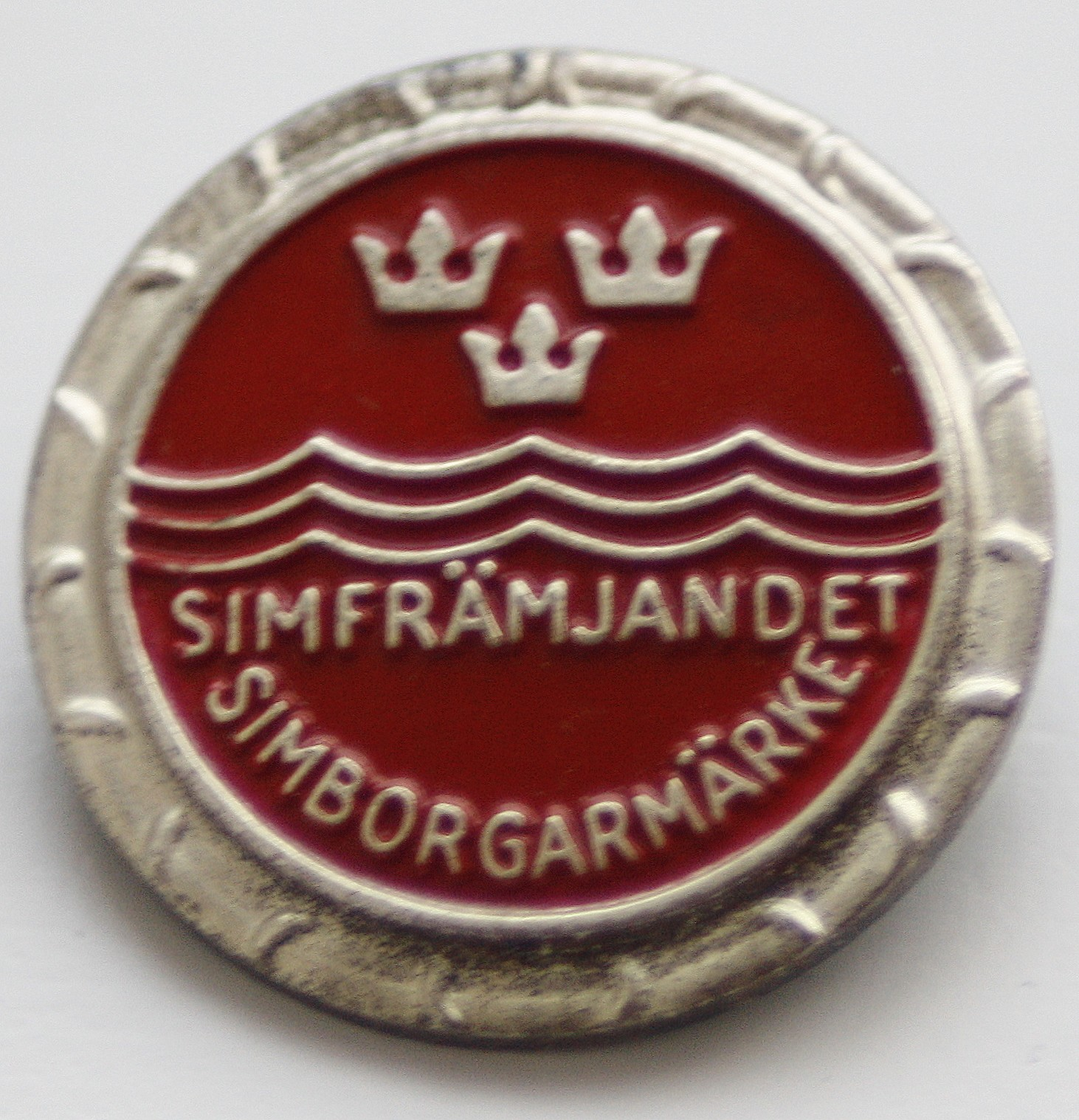 Simborgarmärket